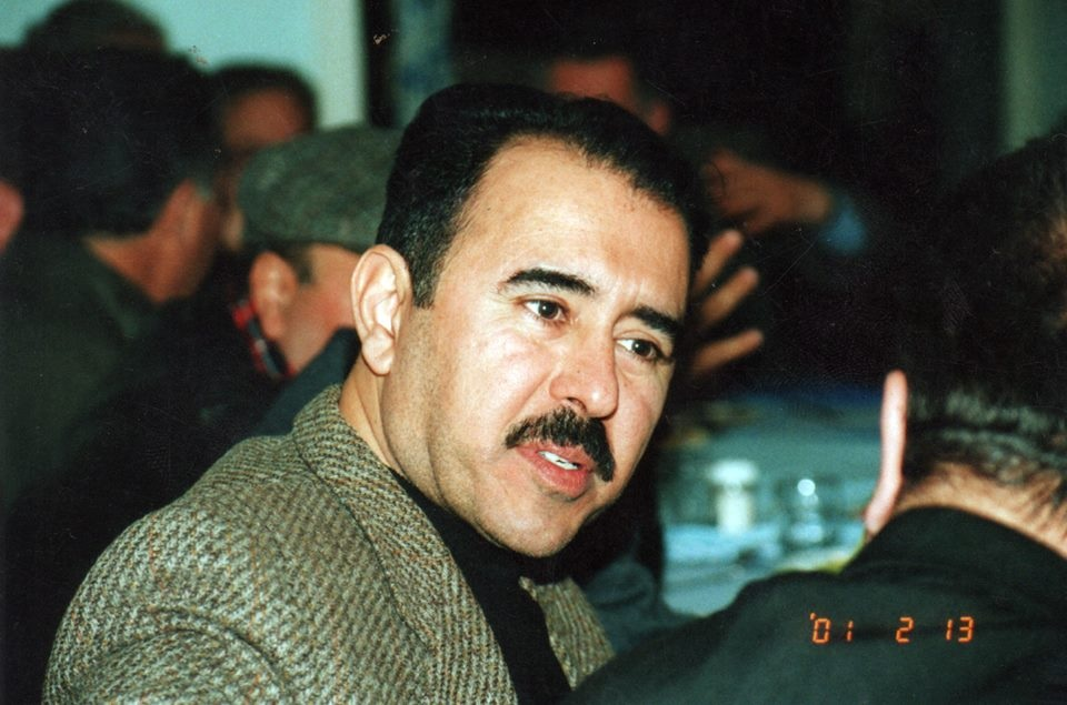 مسلسل